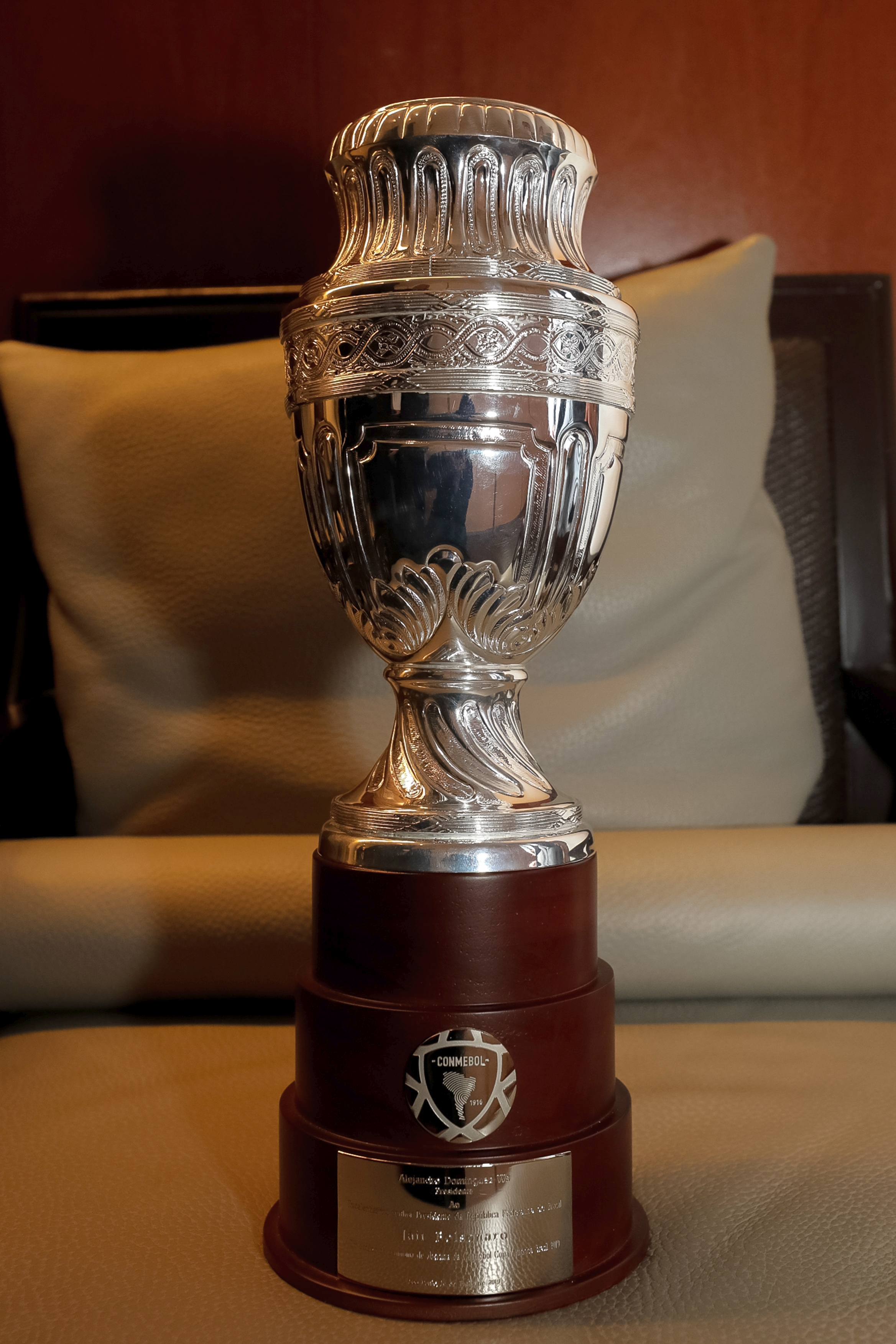 (São Paulo - SP, 14/06/2019) Presidente da República, Jair Bolsonaro recebe taça das mãos do sr. Alejandro Dominguez, Presidente da Conmebol. Foto: Marcos Corrêa/PR